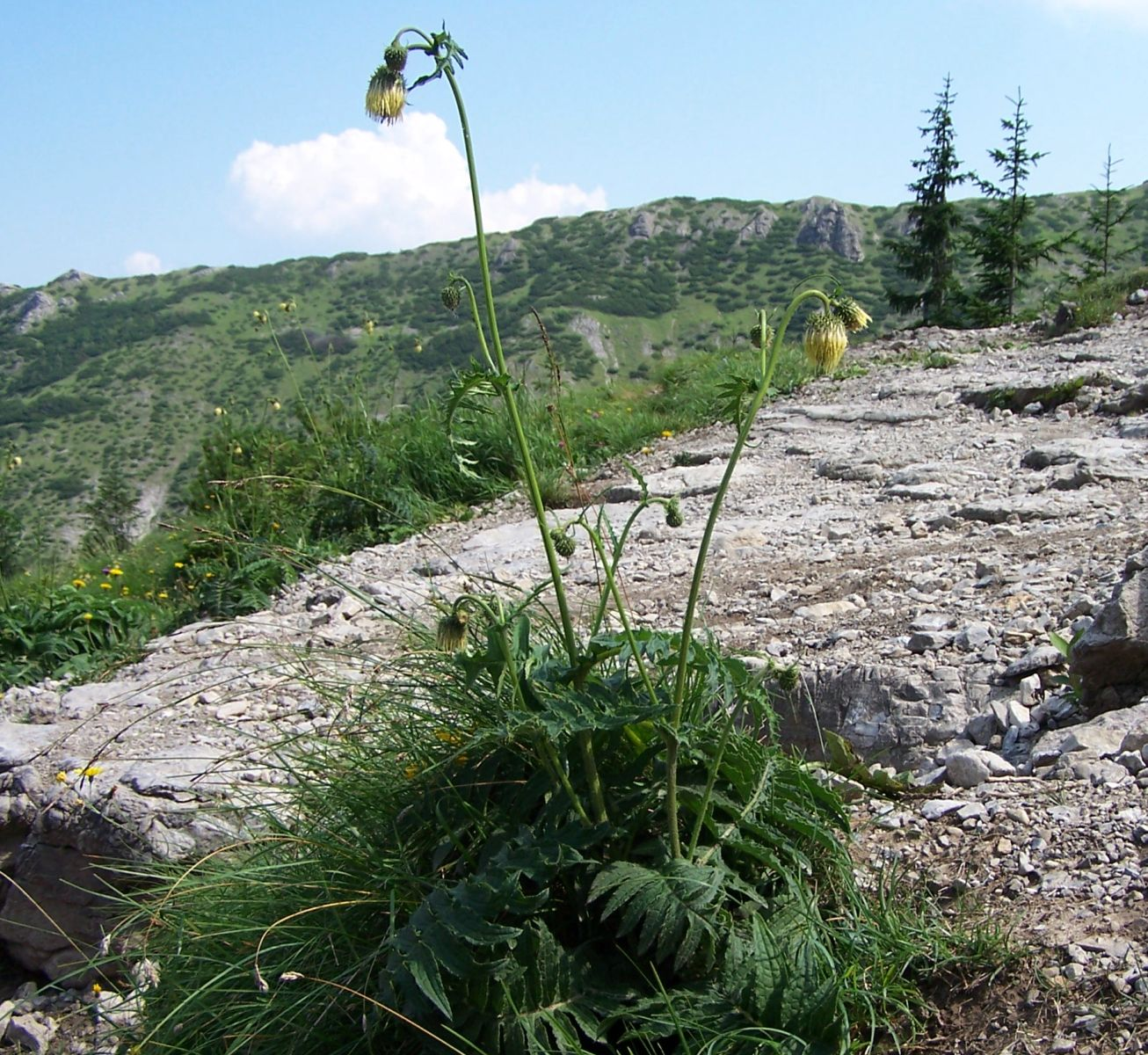 Cirsium erisithales (pl. ostrożeń lepki). habitat: Tatra Mountains, Przełęcz między Kopami